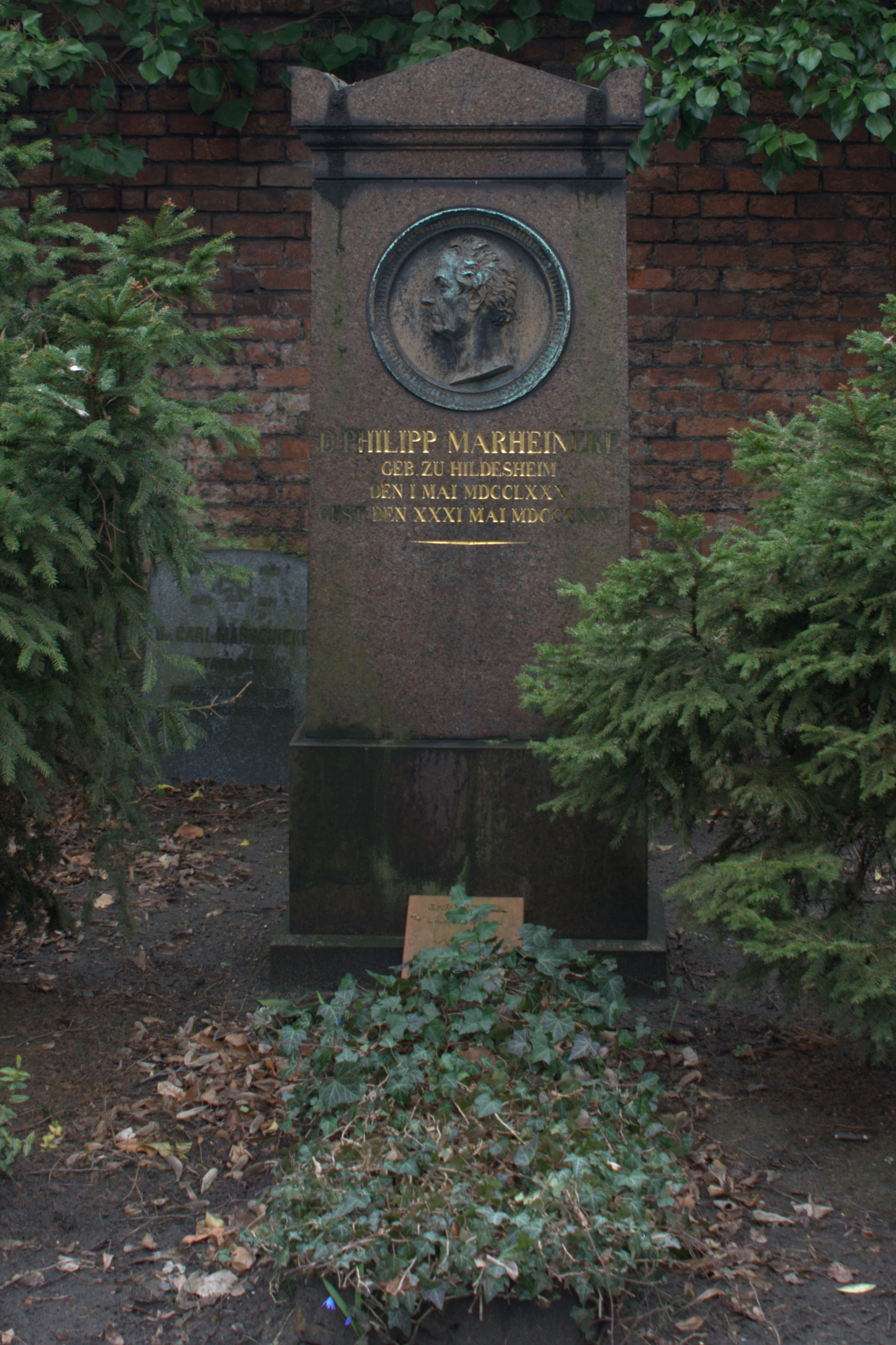 Grab des Pfarrers Philipp Konrad Marheineke in Berlin, Dreifaltigkeitskirchhof II